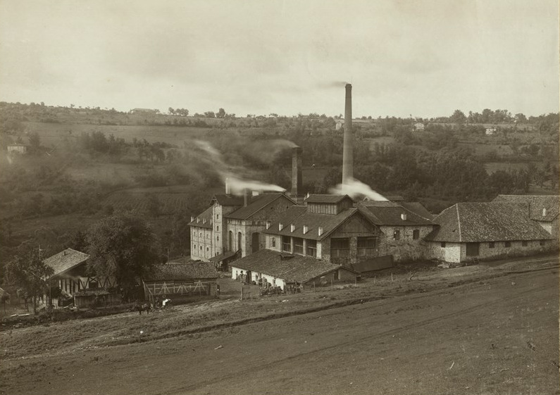 Парна пивоварна фабрика на Никола х. Славчев & С-ие в Търново. Основана в 1892 г. с основен капитал 556 135,66 лева, с 27 работници. През 1912 г. е с основен капитал 1 064 657,35 лева и 60 работници. Фотоалбум с фотографии на български индустриални предприятия от периода 1887-1912 г., подарен от Съюза на българските индустриалци на цар Фердинанд І по случай 25-годишнината от възшествието му на българския престол.